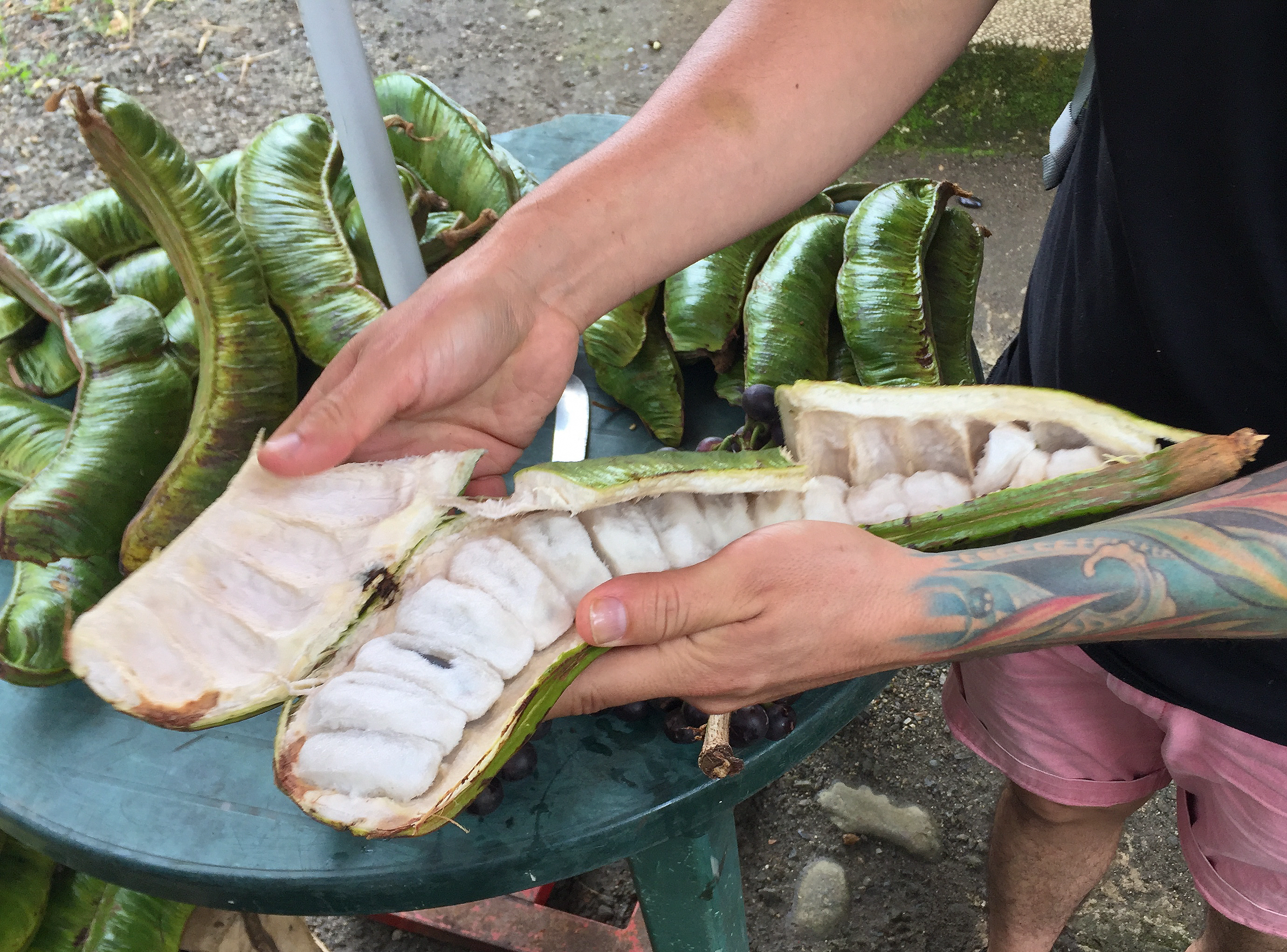 geöffnete Frucht (genannt "Guaba") der Inga brachyptera, aufgenommen in Puyo, Ecuador